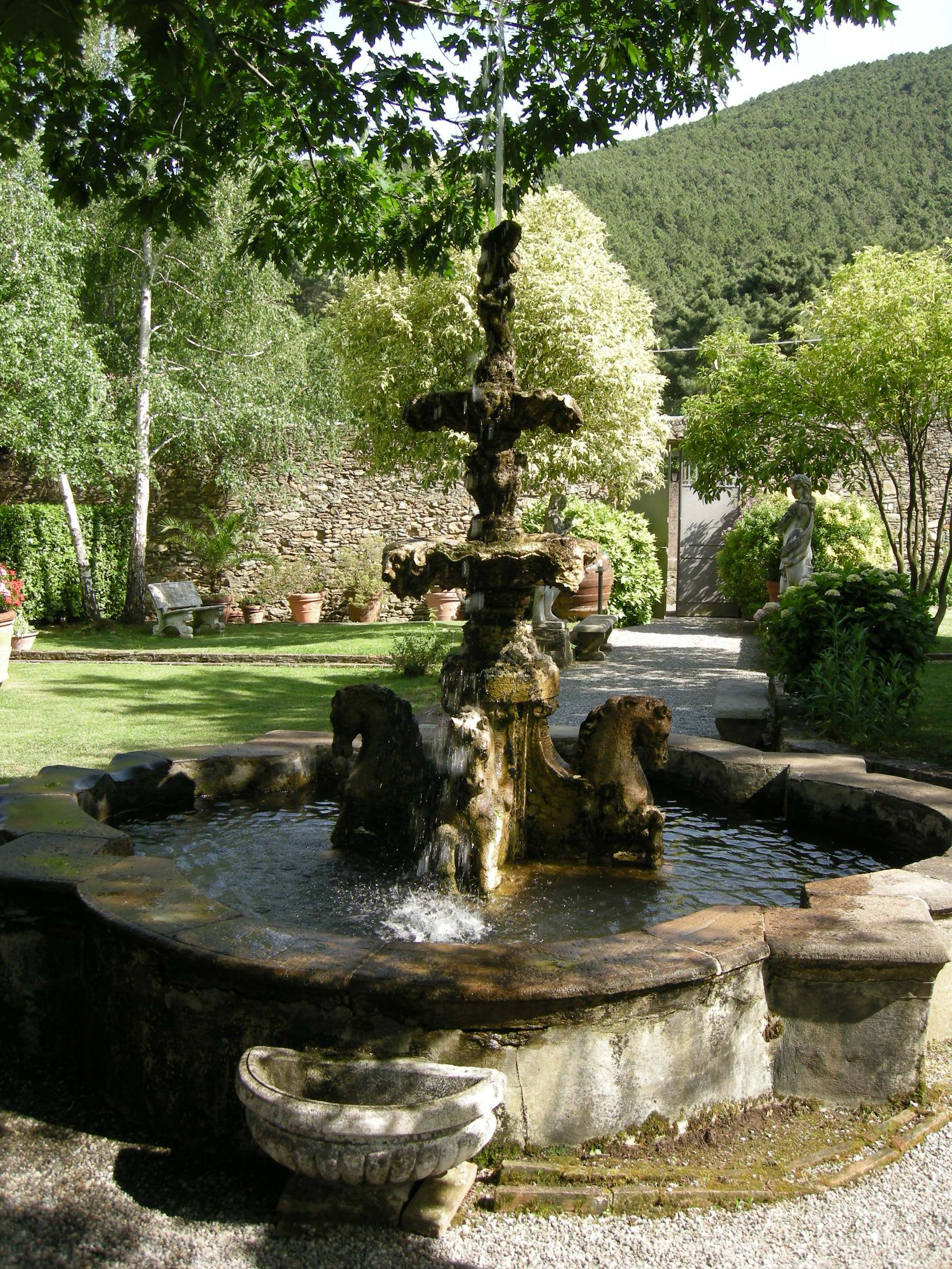 Buti, villa medicea, giardino